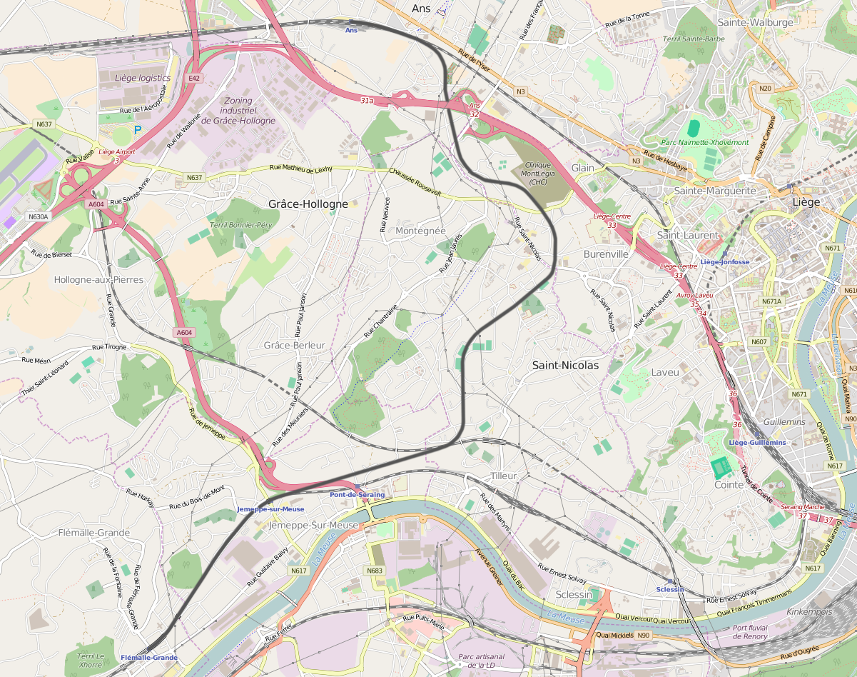 Belgian Railway Line 32, Ans – Flémalle-Haute